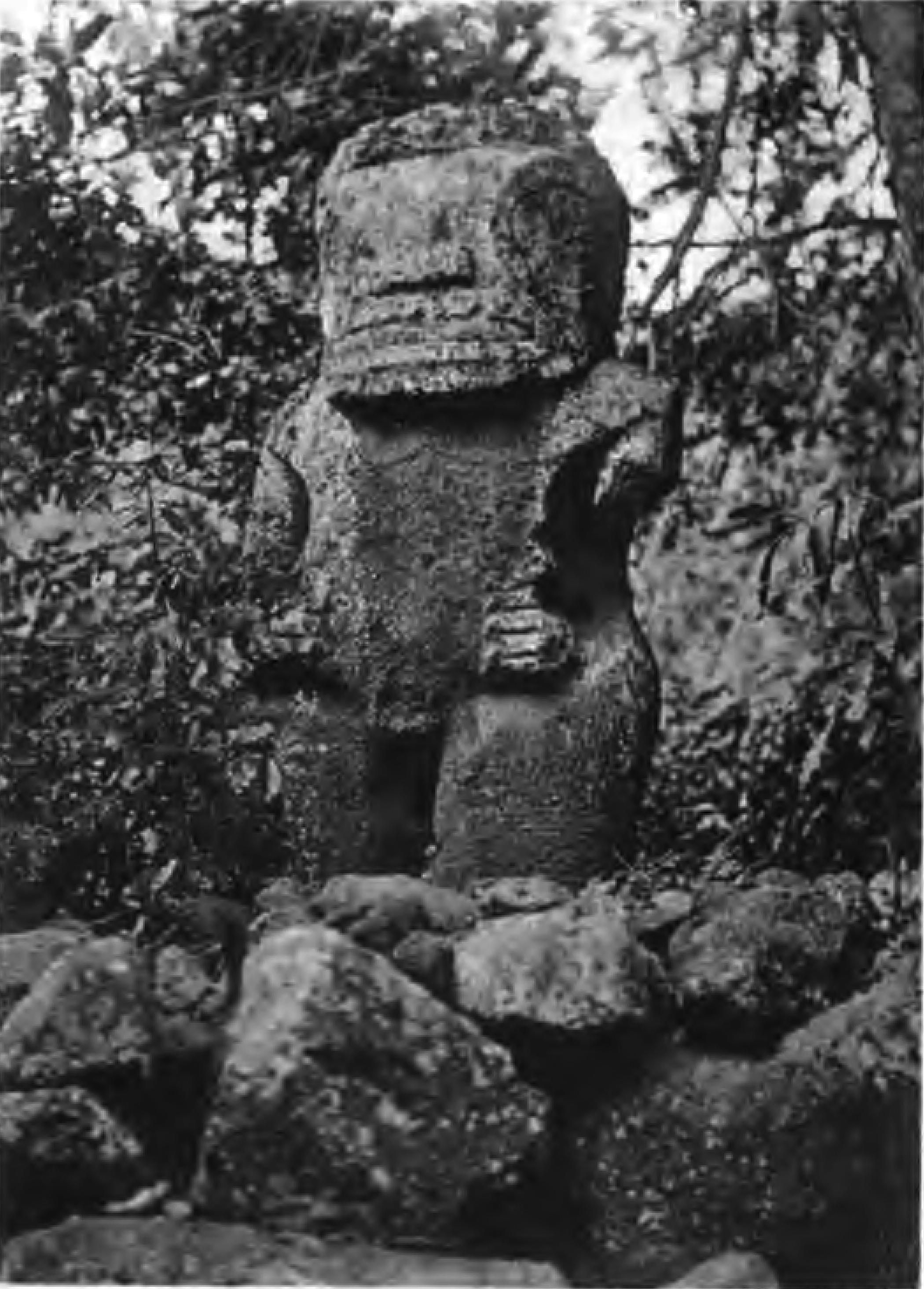 Tiki Takaii, Hivaoa, Marquesas-Inseln